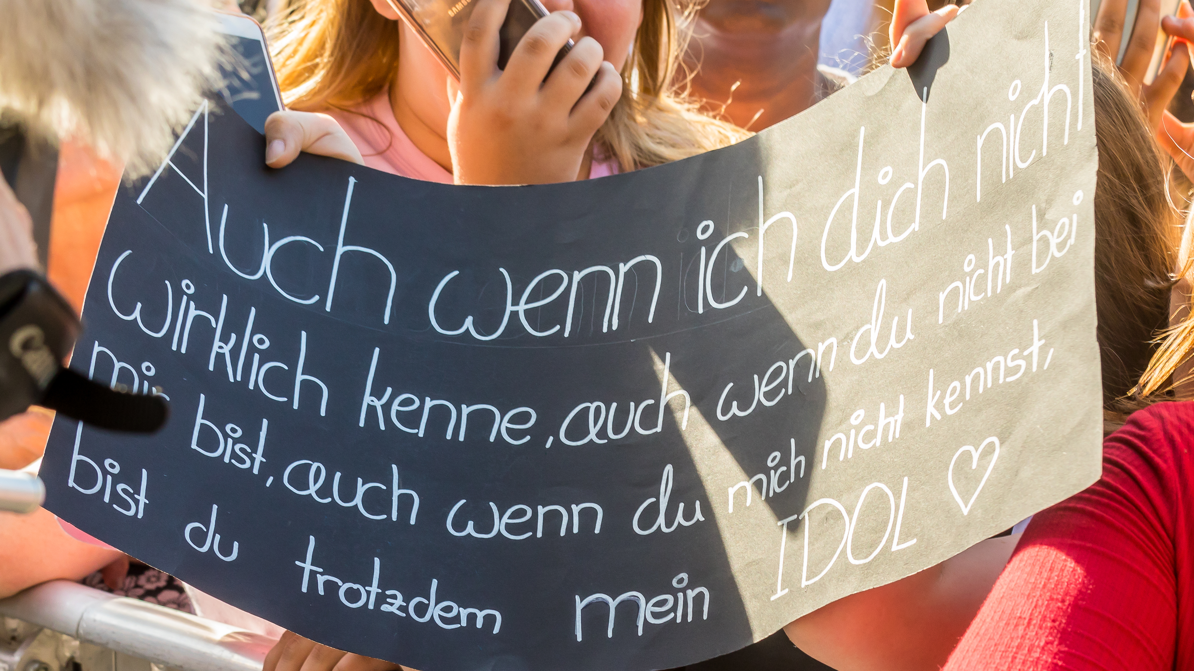 ColognePride/CSD 2018 - Auftritt von Lukas Rieger auf der Hauptbühne, Heumarkt